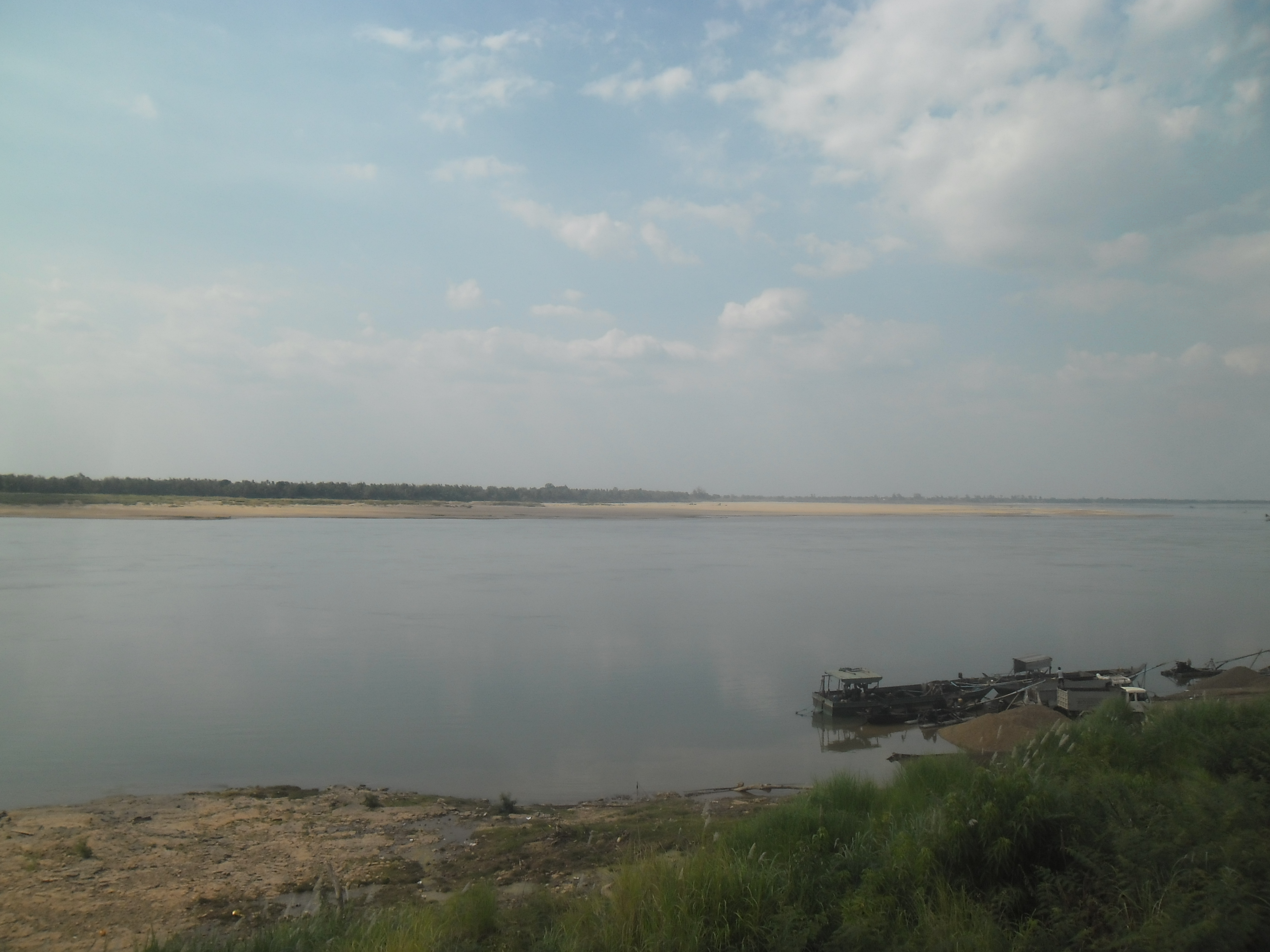 Kratie